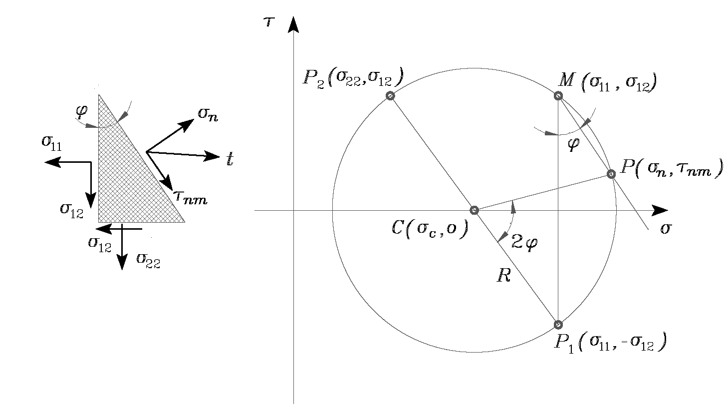 Mohr's circle general scheme